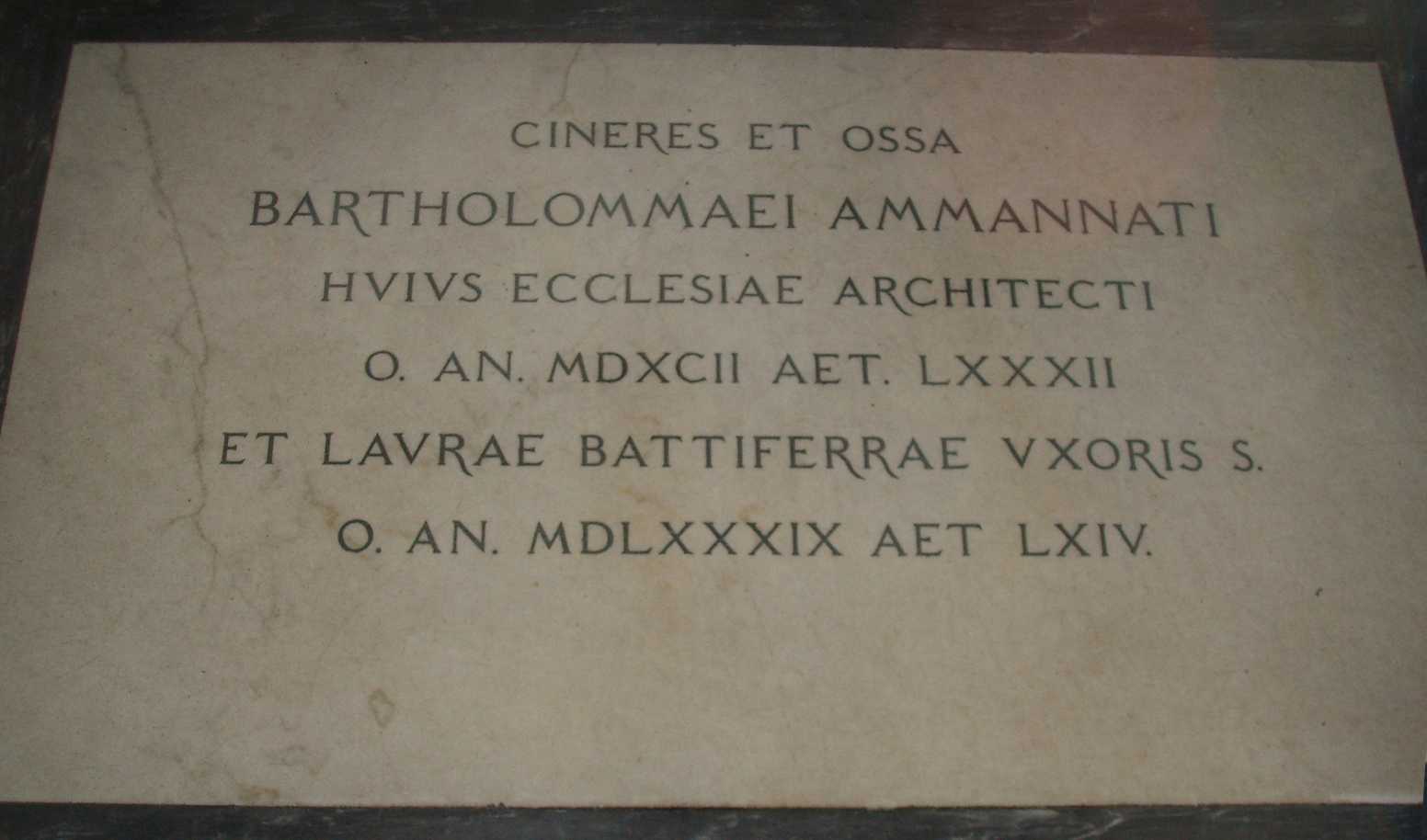 San giovanni degli scolopi, lapide di bartolomeo ammannati